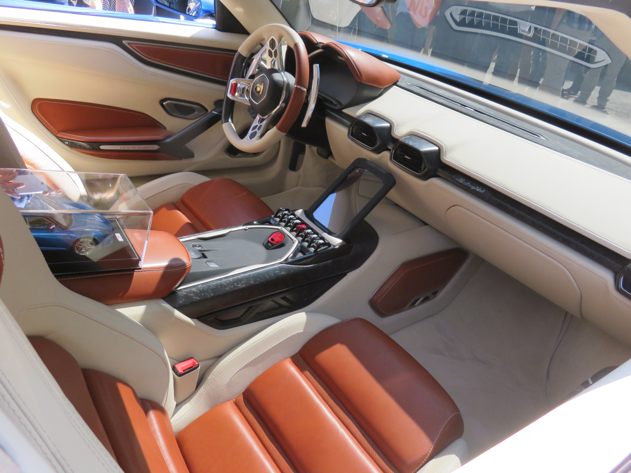 Lamborghini Asterion LPI910/4, Concours d'élégance Villa d'Este 2015